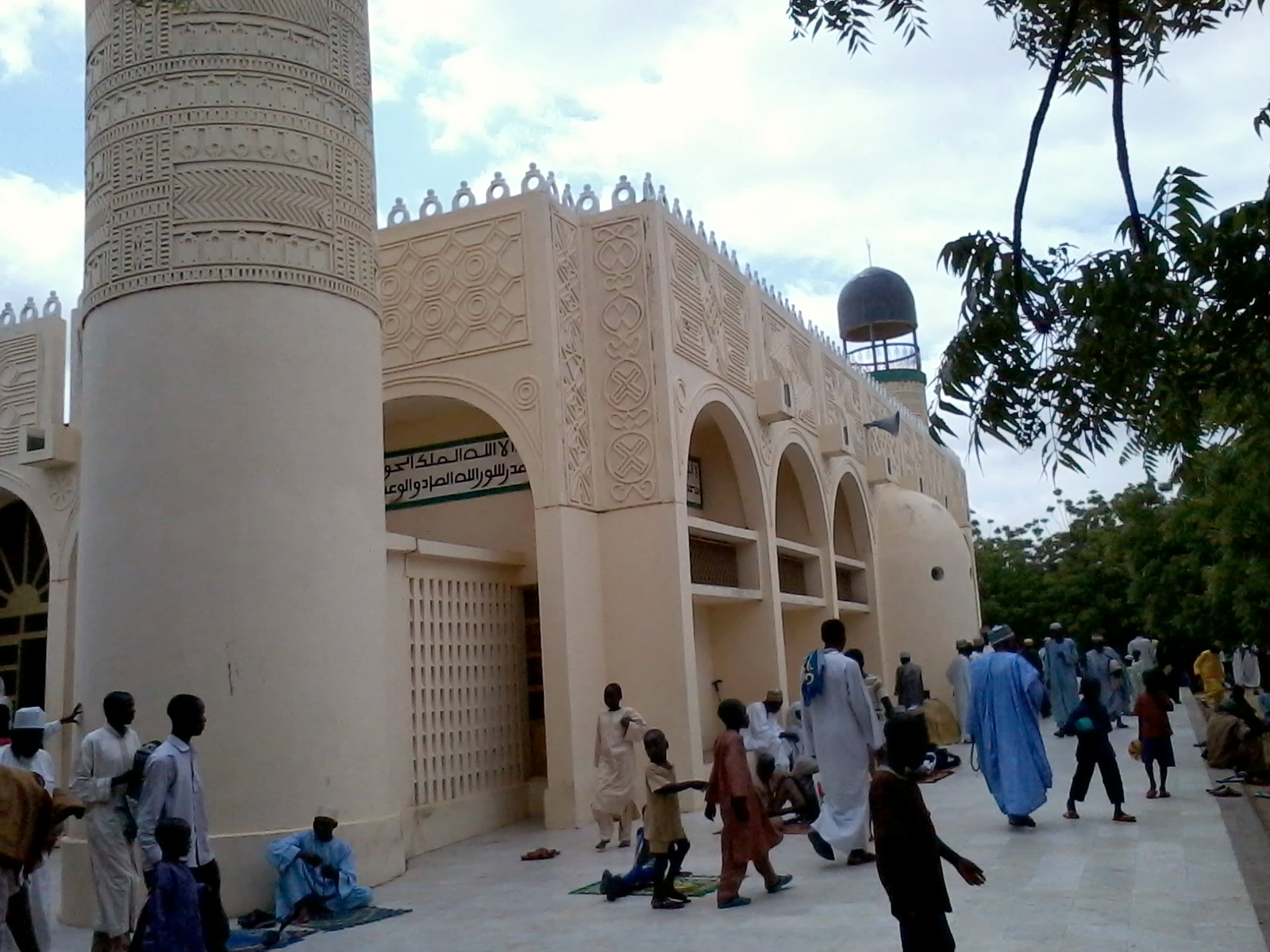 Mosque de Tchana Maradi